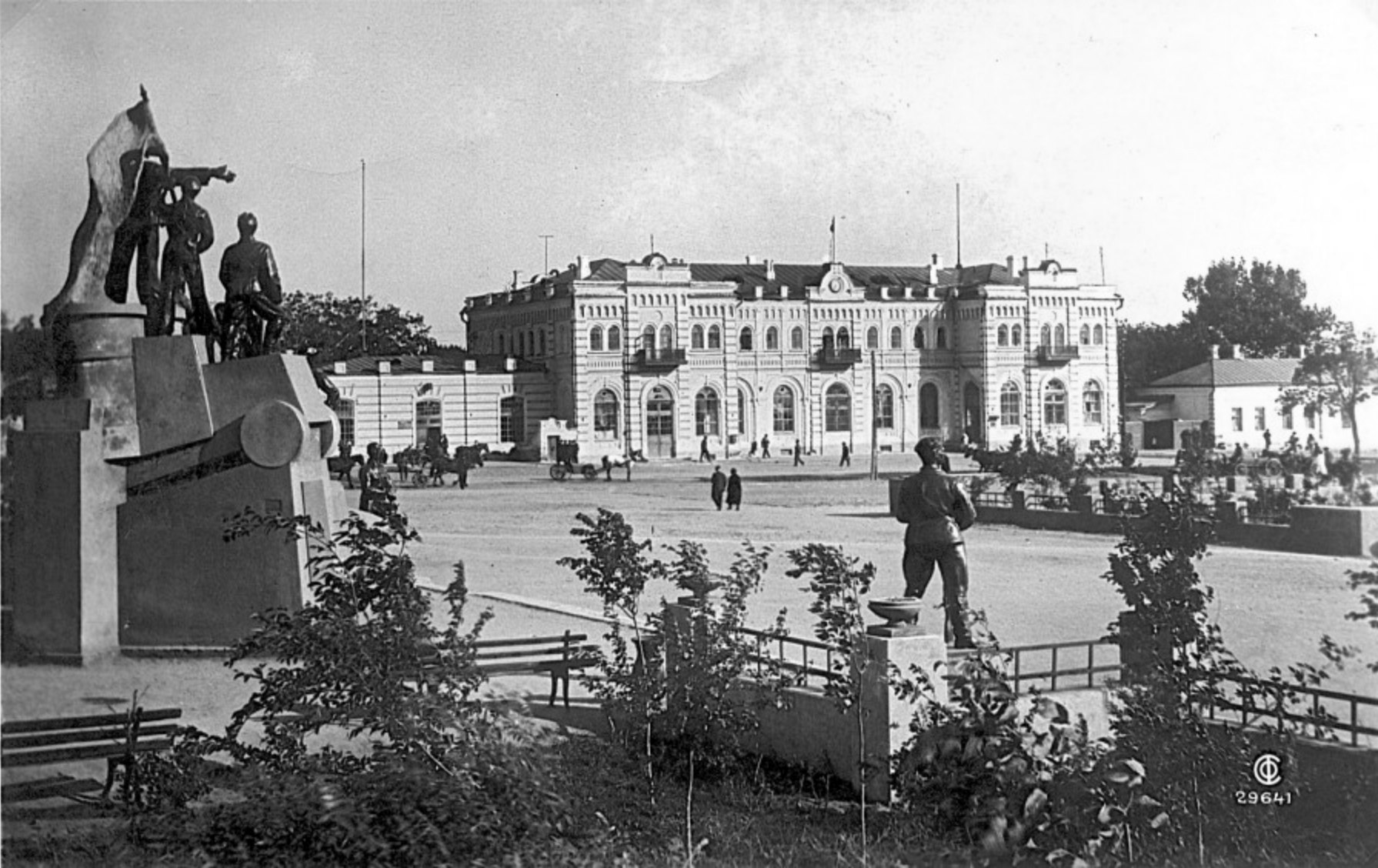 Памятник Ленину, Таганрог, Ярмарочная площадь. Фотооткрытка "Союзфото".